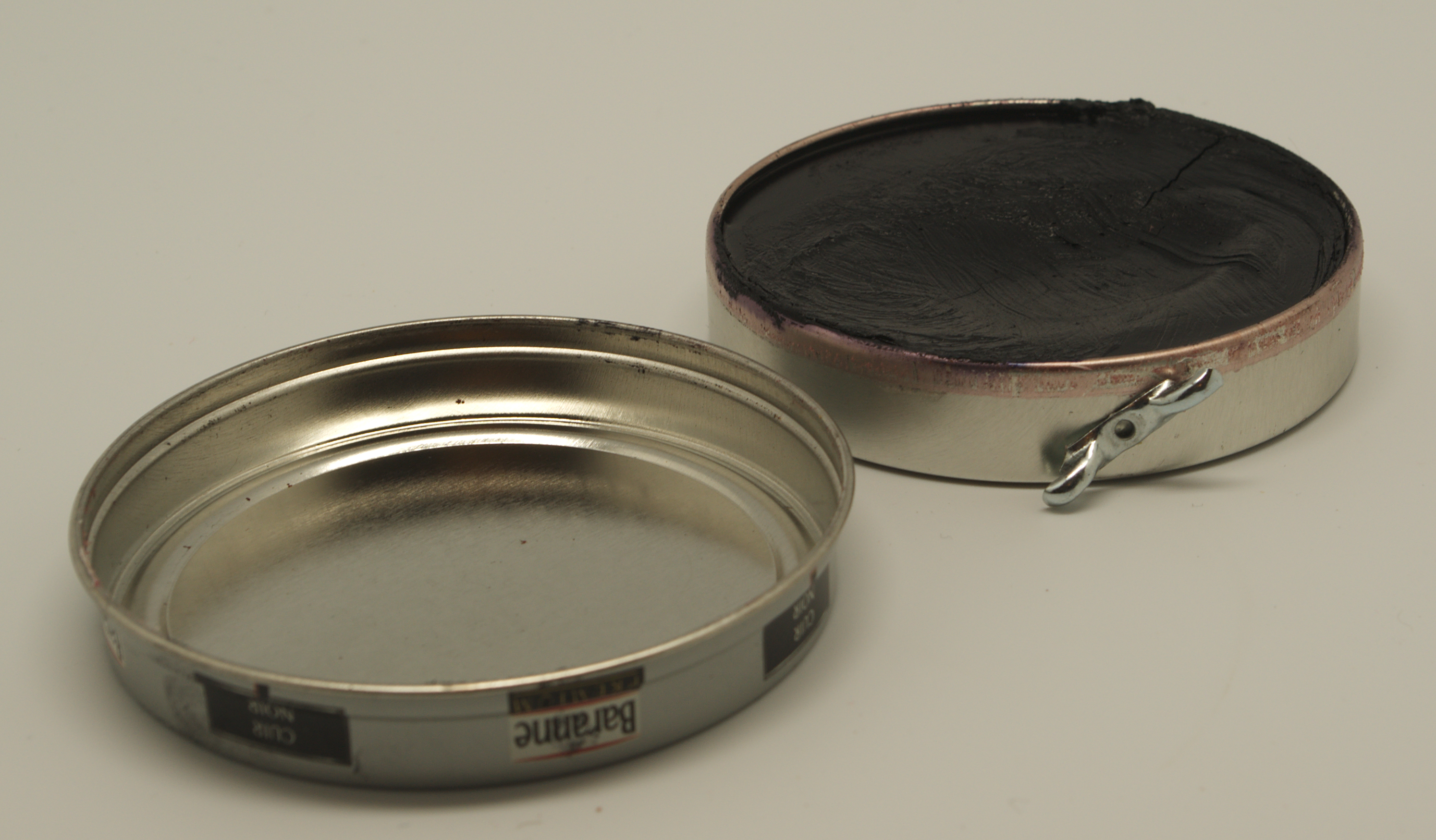 Boite de cirage noir Baranne